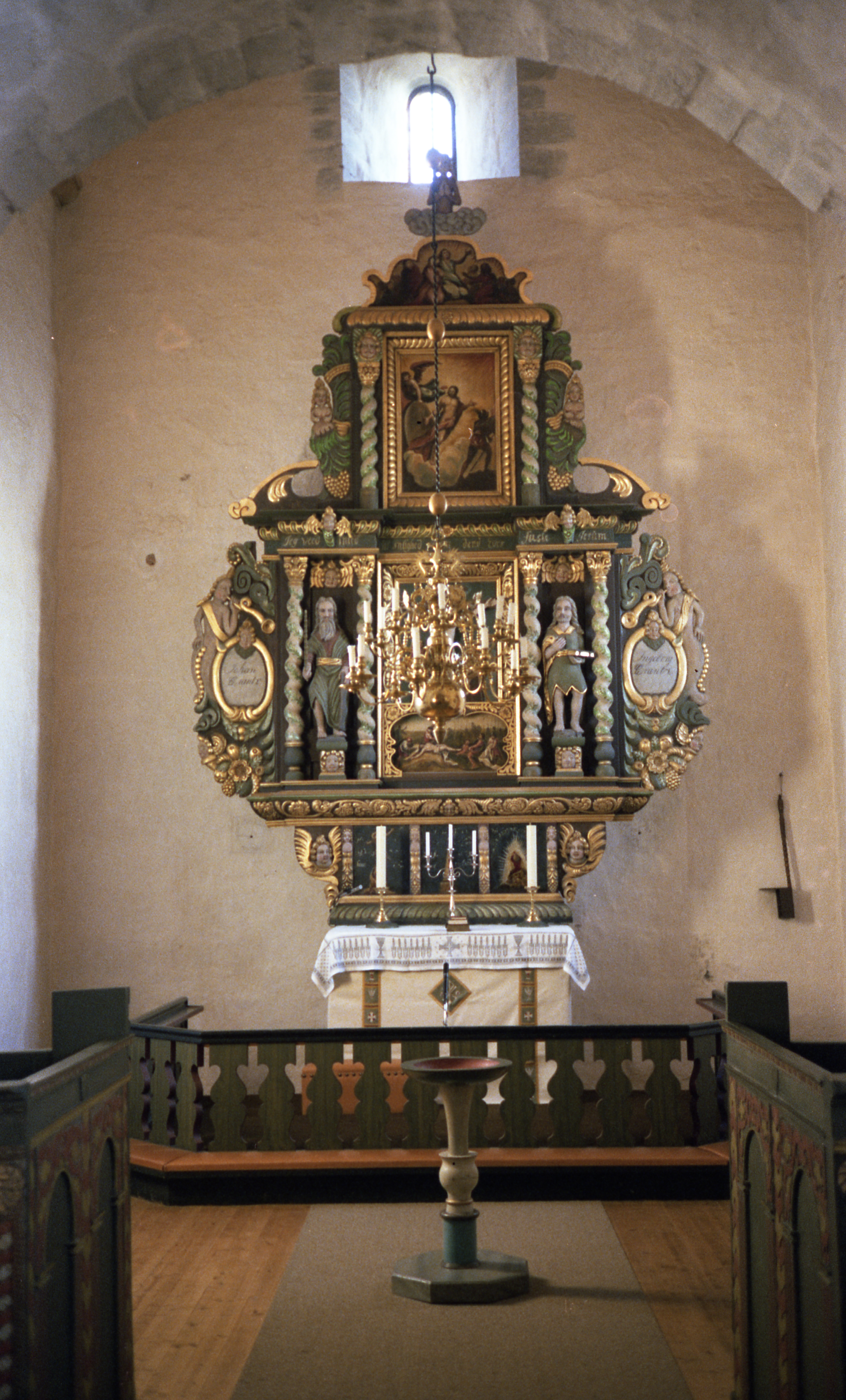 Format: 35 mm fargenegativ Film: Kodak Safety Film 5036 Dato / Date: November 1980 Fotograf / Photographer: G. H. / Byantikvaren Sted / Place: Byneset kirke, Trondheim Wikipedia: Byneset kirke Eier / Owner Institution: Trondheim byarkiv, The Municipal Archives of Trondheim Arkivreferanse / Archive reference: Tor.H43.P02.F8450 Merknad: Byneset kirke [...] er en av landets eldste steinkirker og kan være bygd ferdig under erkebiskop Øystein Erlendsson (1161 - 88). Kirken var viet til St. Mikael og kan være innviet før 1180. Steinhuggermerker viser at de samme steinhuggerne som under erkebiskop Øystein arbeidet på Domkirken, også arbeidet på kirken på Byneset. Den er første gang nevnt i en skriftlig kilde fra 1253, da erkebiskop Sørle gav bispetienden av Byneset til kannikenes felles bordhold. 1725 ble kirken solgt til skriver Morten Wiums arvinger for 896 riksdaler; 1803 ble den kjøpt av bøndene på Byneset. [...] Kirken ble restaurert i 1960-årene. [...] Ved restaureringen ble det avdekket flere sene 1500-talls kalkmalerier, som bl.a. viser de syv dødssynder og dommedag. Et svært velbevart og interessant maleri er skjult av en salmenummertavle. Det viser en synder (fråtser) som ligger på rygg med oppblåst buk; i munnen har han en trakt, og i den lar en djevel det falle en uavbrutt strøm av avføring. Et annet bilde viser syndemannen, hvor slanger angriper de delene av mannens kropp som representerer de ulike syndene. Kirken har et rikt etterreformatorisk inventar. Altertavlen og prekestolen er i barokkstil; den førstnevnte er trolig utført av Lars Peder og Erich Kolstrup 1695/1715, den sistnevnte av Johan Biltsnider 1652. Det finnes to dåpsfat, et fra ca. 1650 og et fra ca. 1750. Klokkene er støpt 1794 og 1845 (den siste er en omstøpning av en eldre klokke fra 1634). [...] (Kilde: Trondheim byleksikon, 2008)